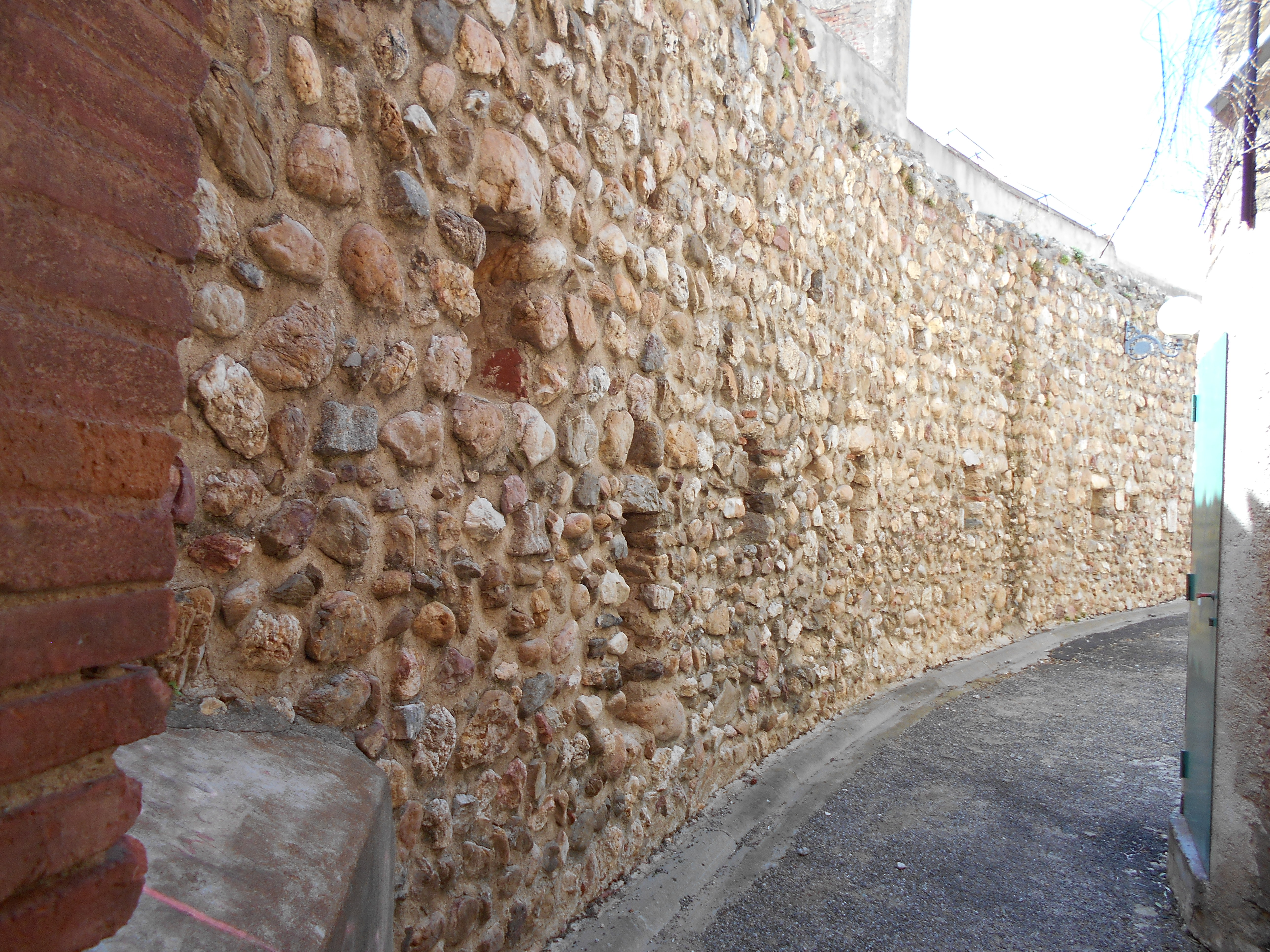 Les muralles 2